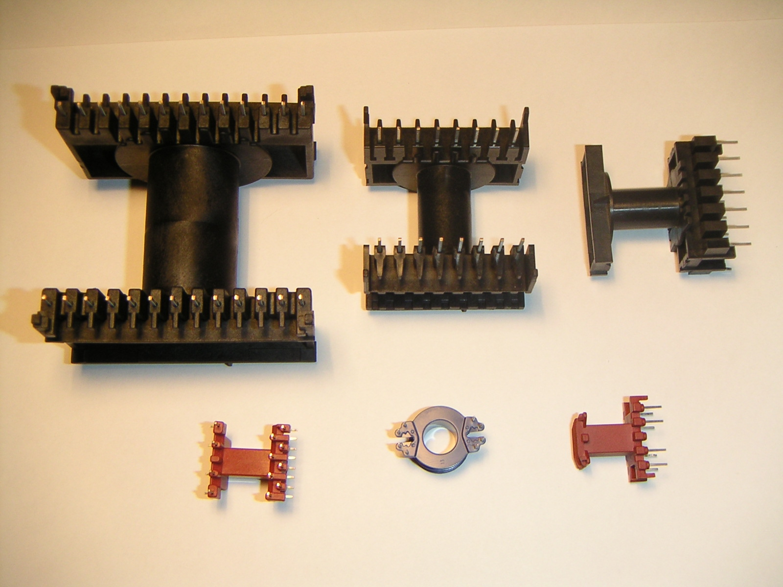 diverse Spulenkörper aus Kunststoff für induktive Bauteile Bild selbst fotografiert, GNU FDL